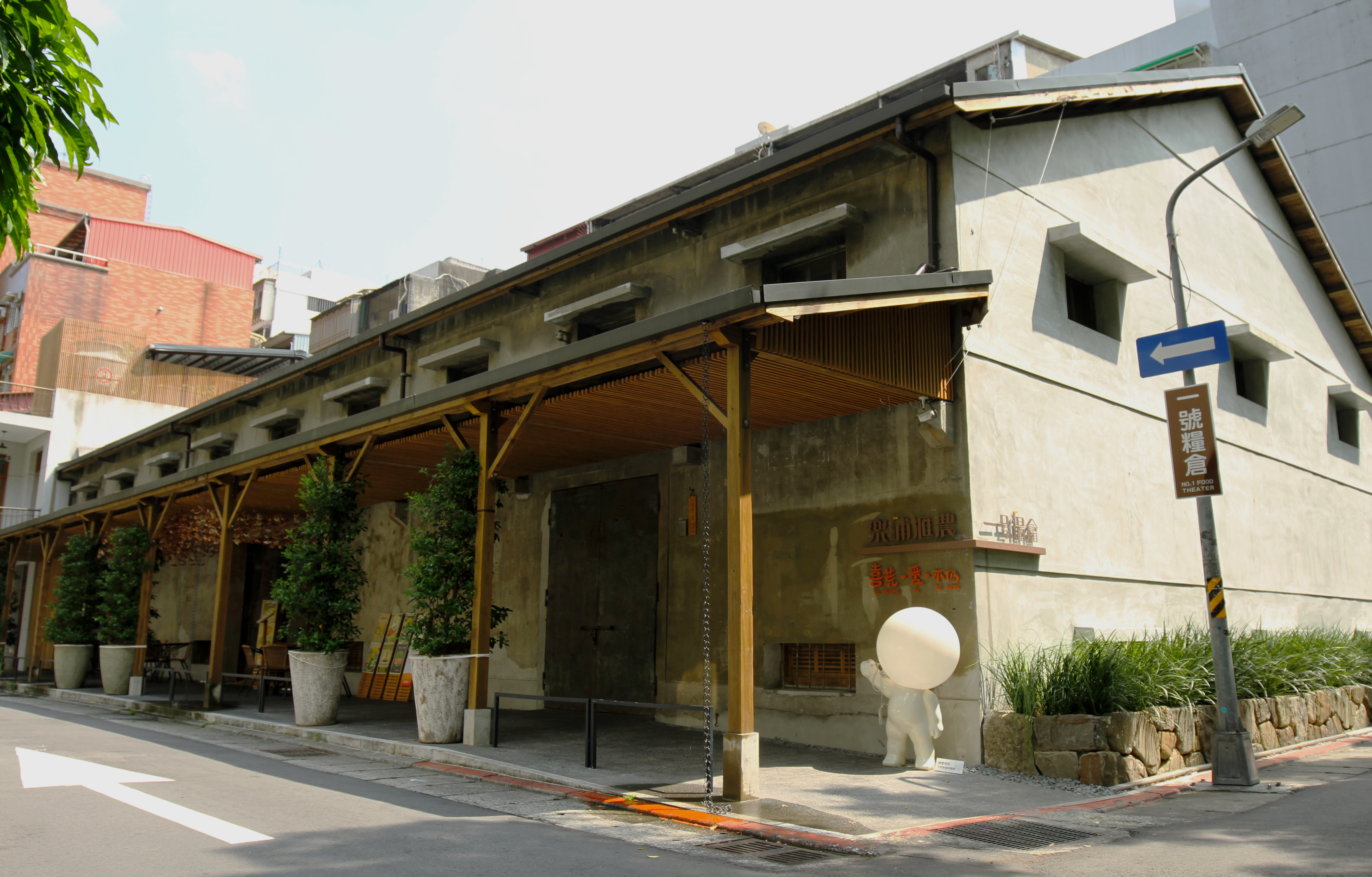 日據時期台北市首座糧倉。經修復後，現為複合式商場，一樓販售農產品，二樓為餐廳。